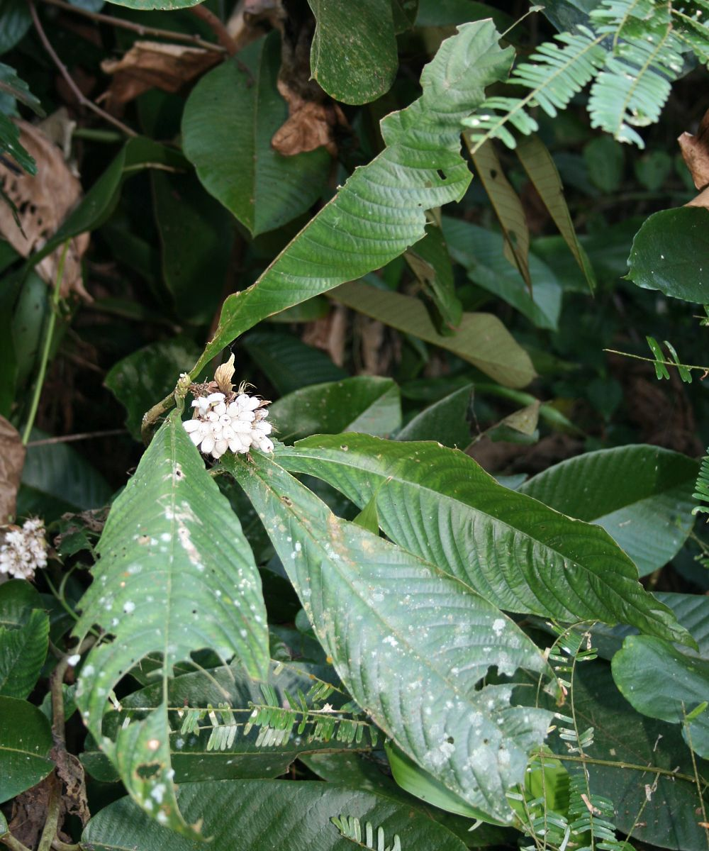 Mycetia tonkinensis (= Myrioneuron tonkinense), Rubiaceae - Vietnam/Việt Nam: S Pa So, Phong Thổ (Prov. Lai Châu)